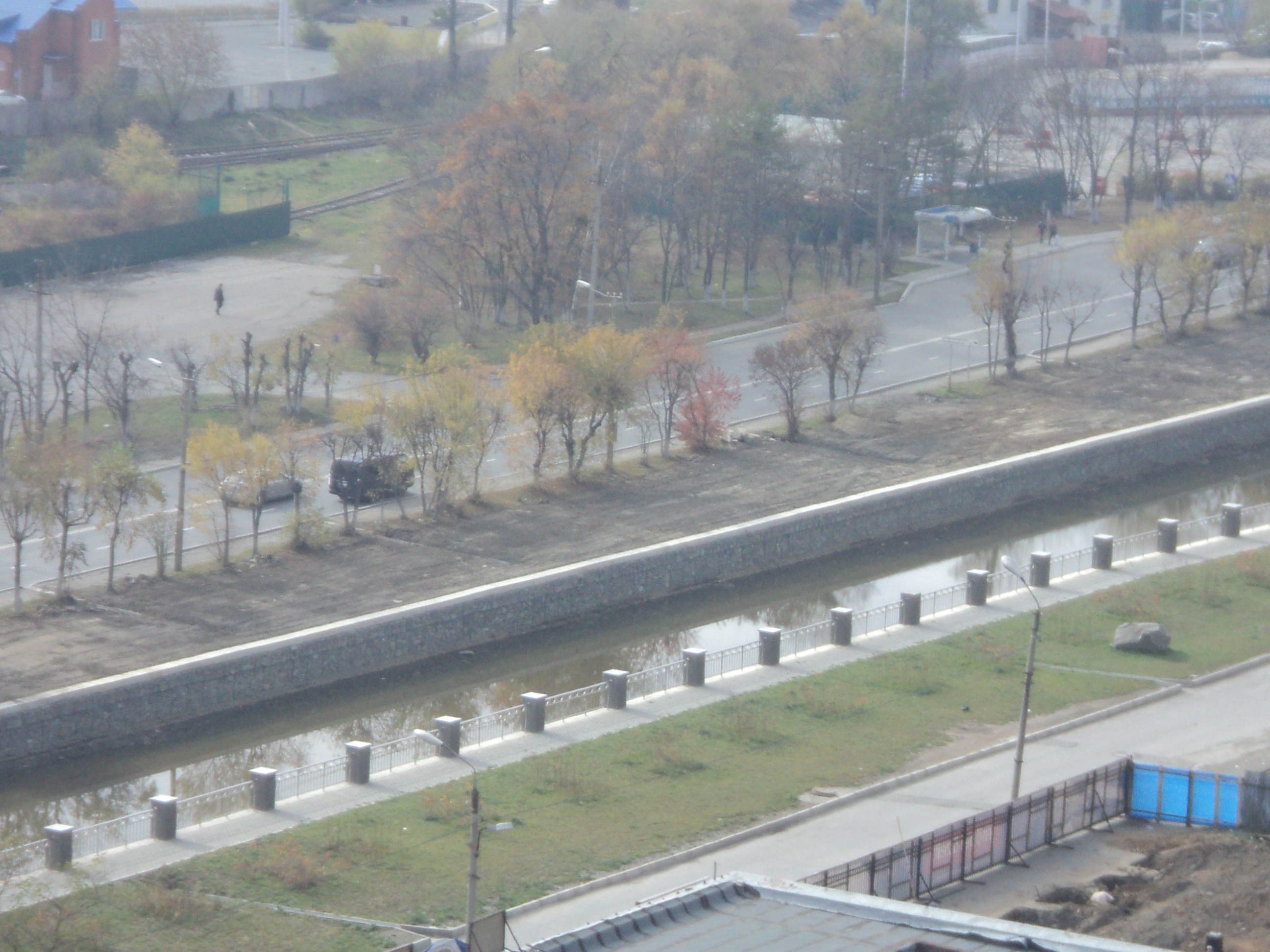 Вид на Каменку с сопки Лебединой